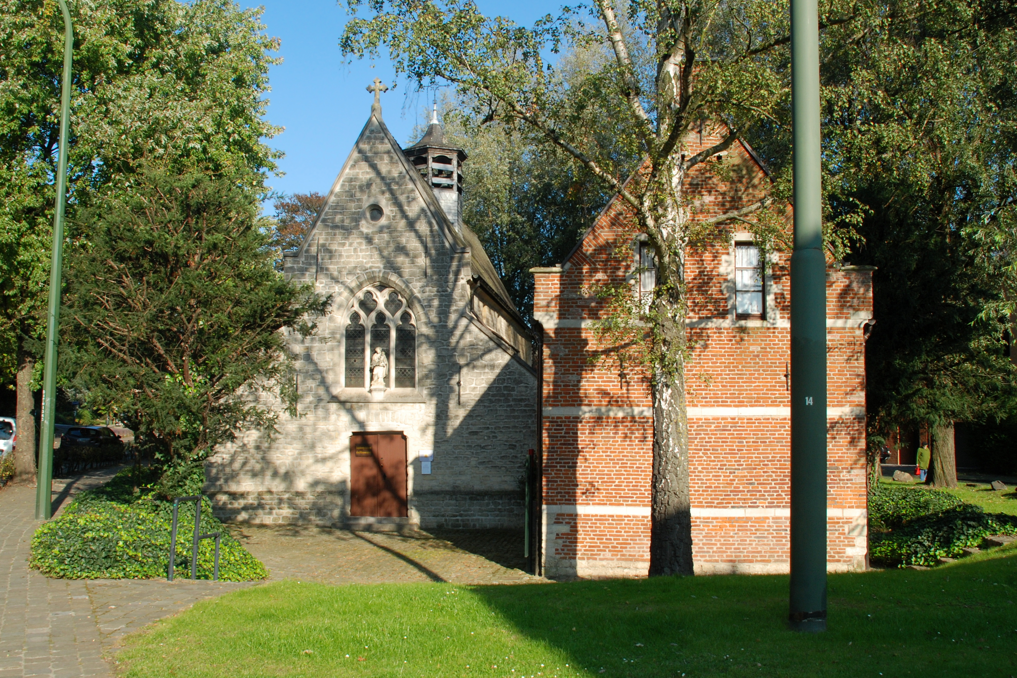 Belgique - Bruxelles - Uccle - Chapelle de Stalle